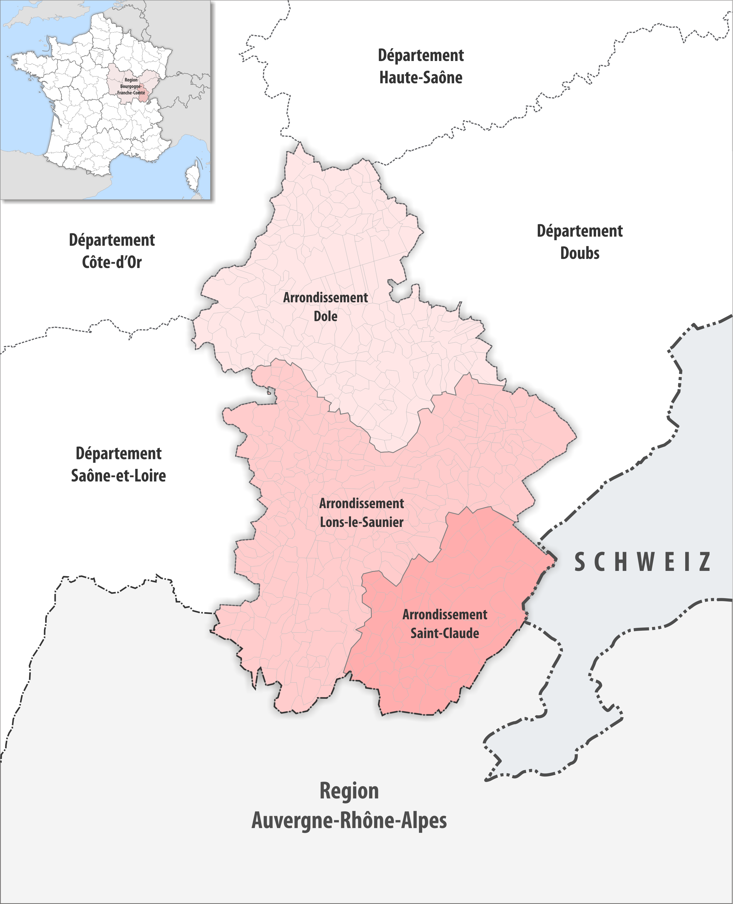 Gemeinden und Arrondissemente im Departement Jura